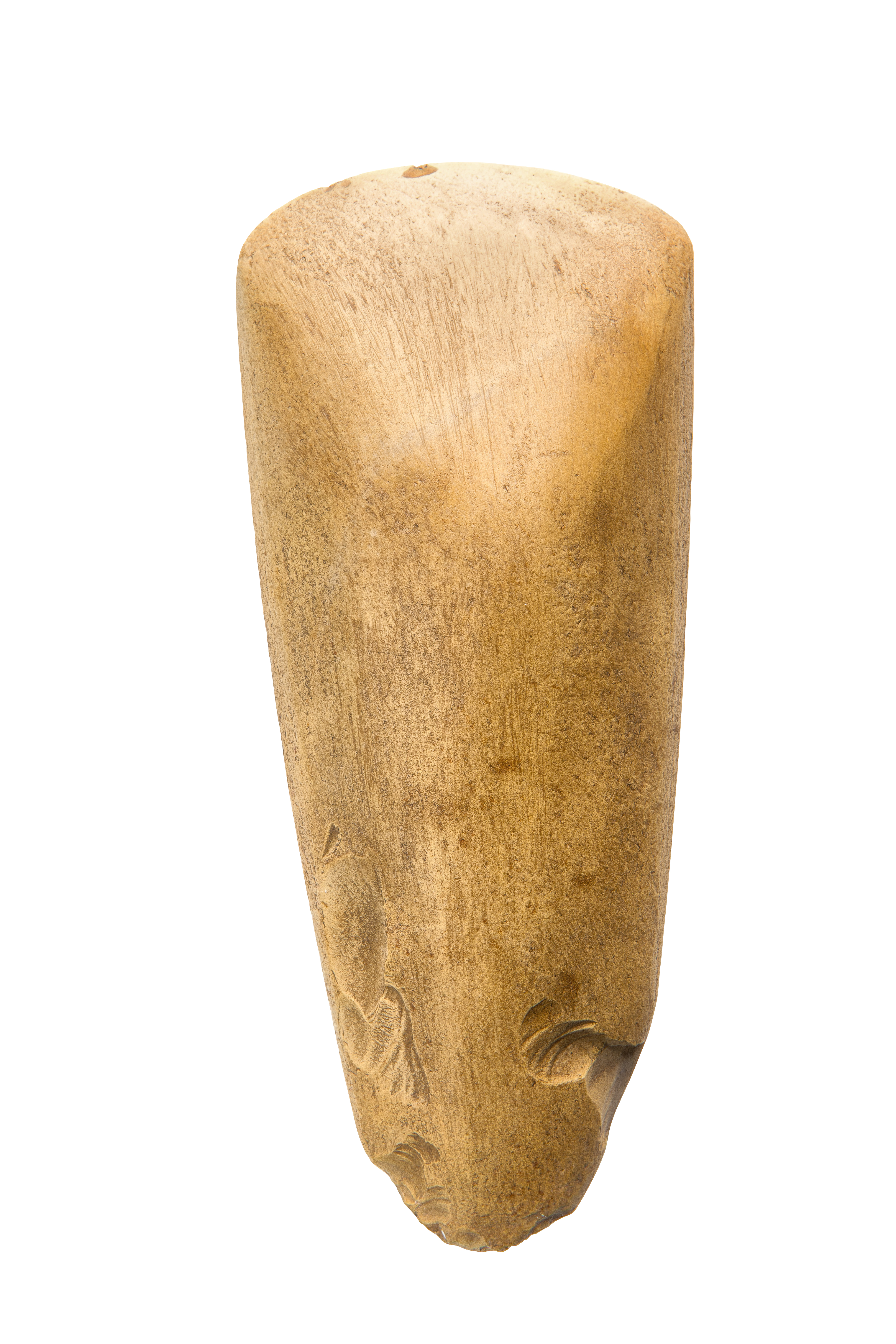 Gepolijste bijl in silex, 4300 tot 1800 VC, vindplaats: Hamont of Achel, collectie Gallo-Romeins Museum Tongeren, 7